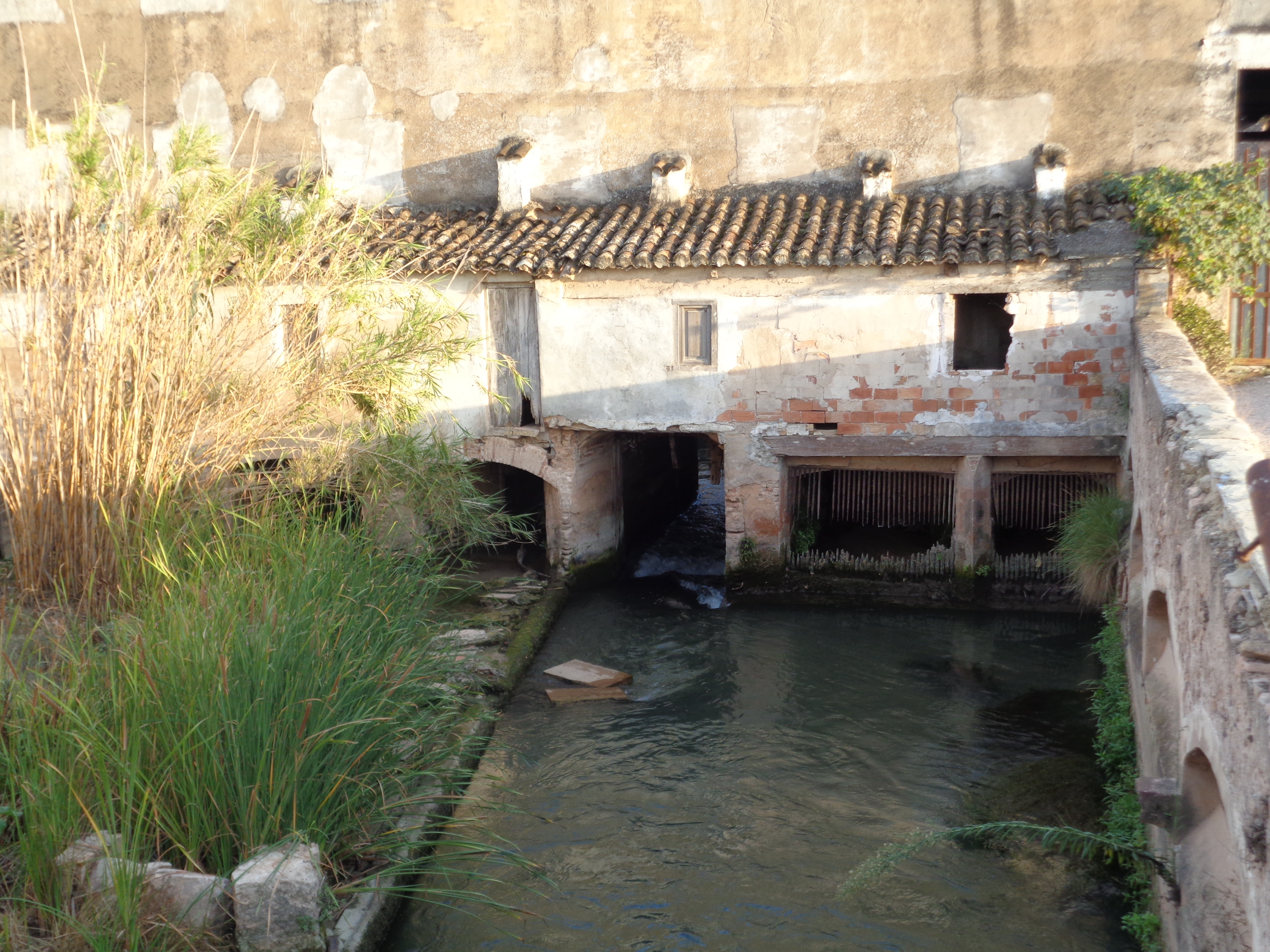 Paterna.